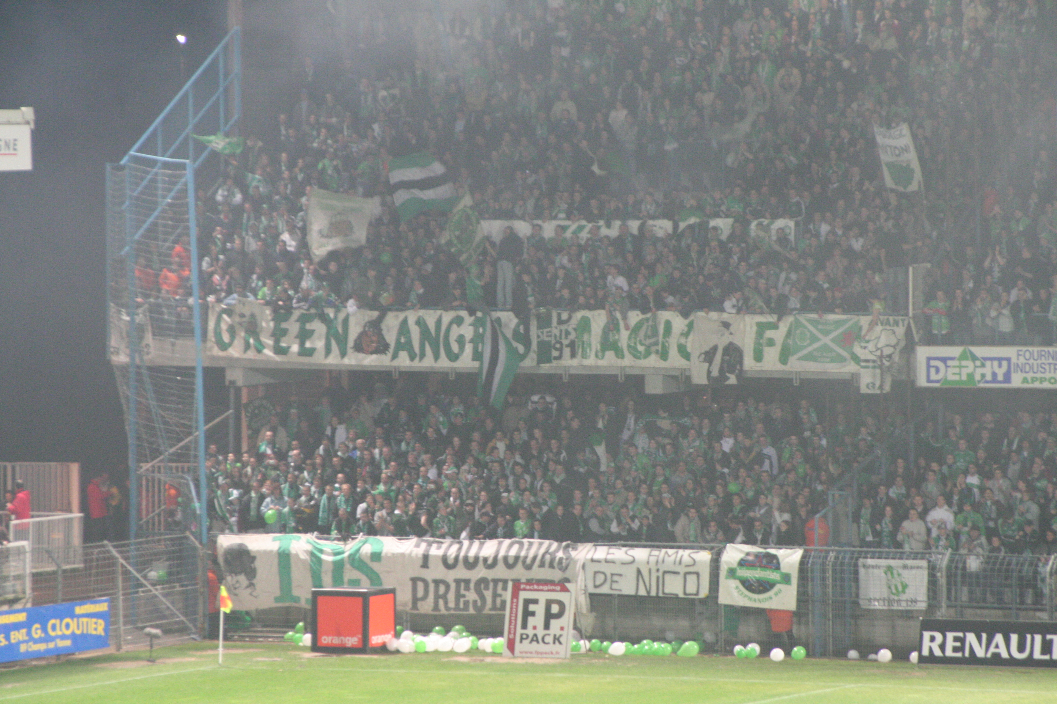 AJ Auxerre - AS Saint Etienne